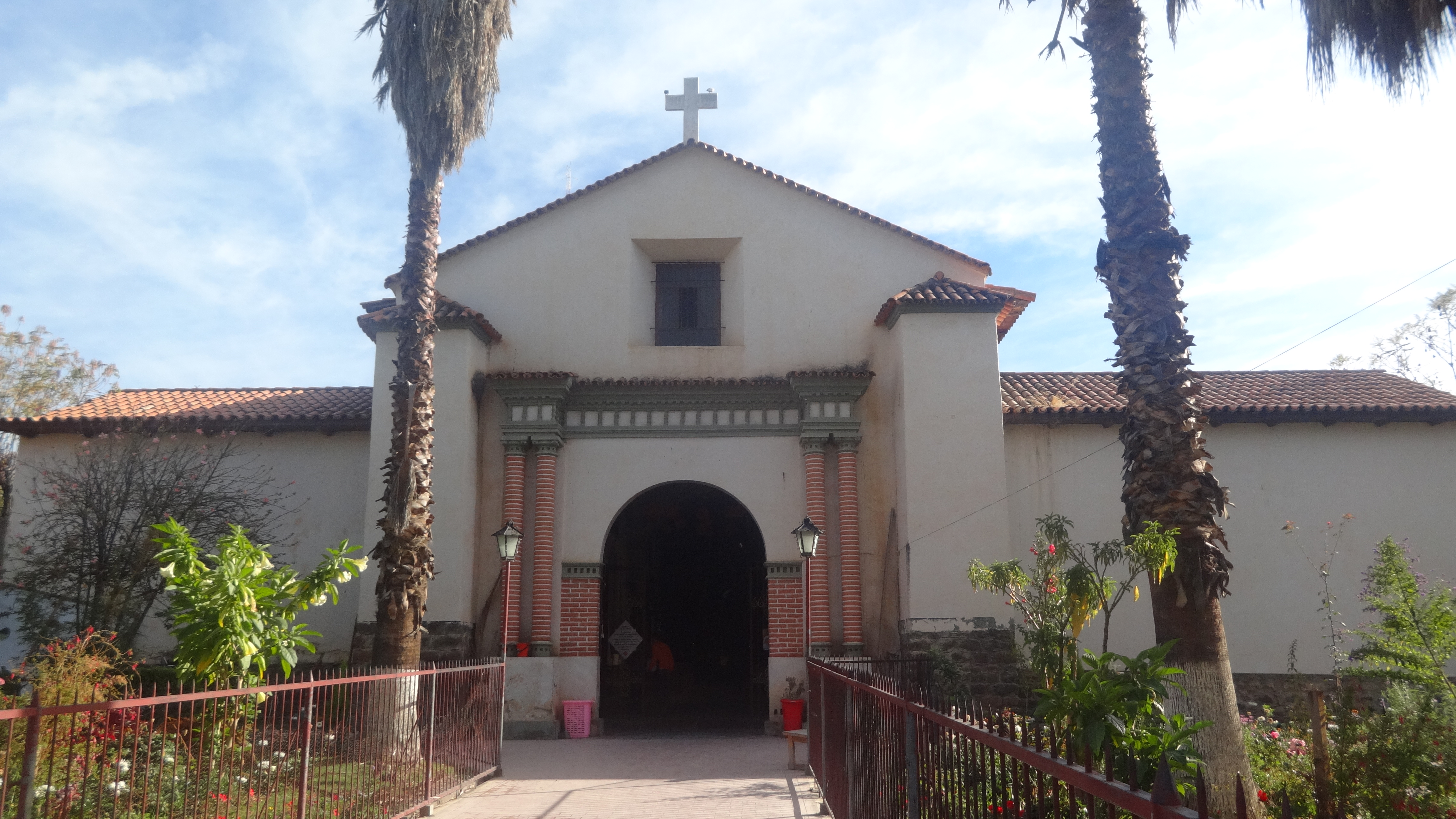 El Templo de El Paso con un estilo Colonial